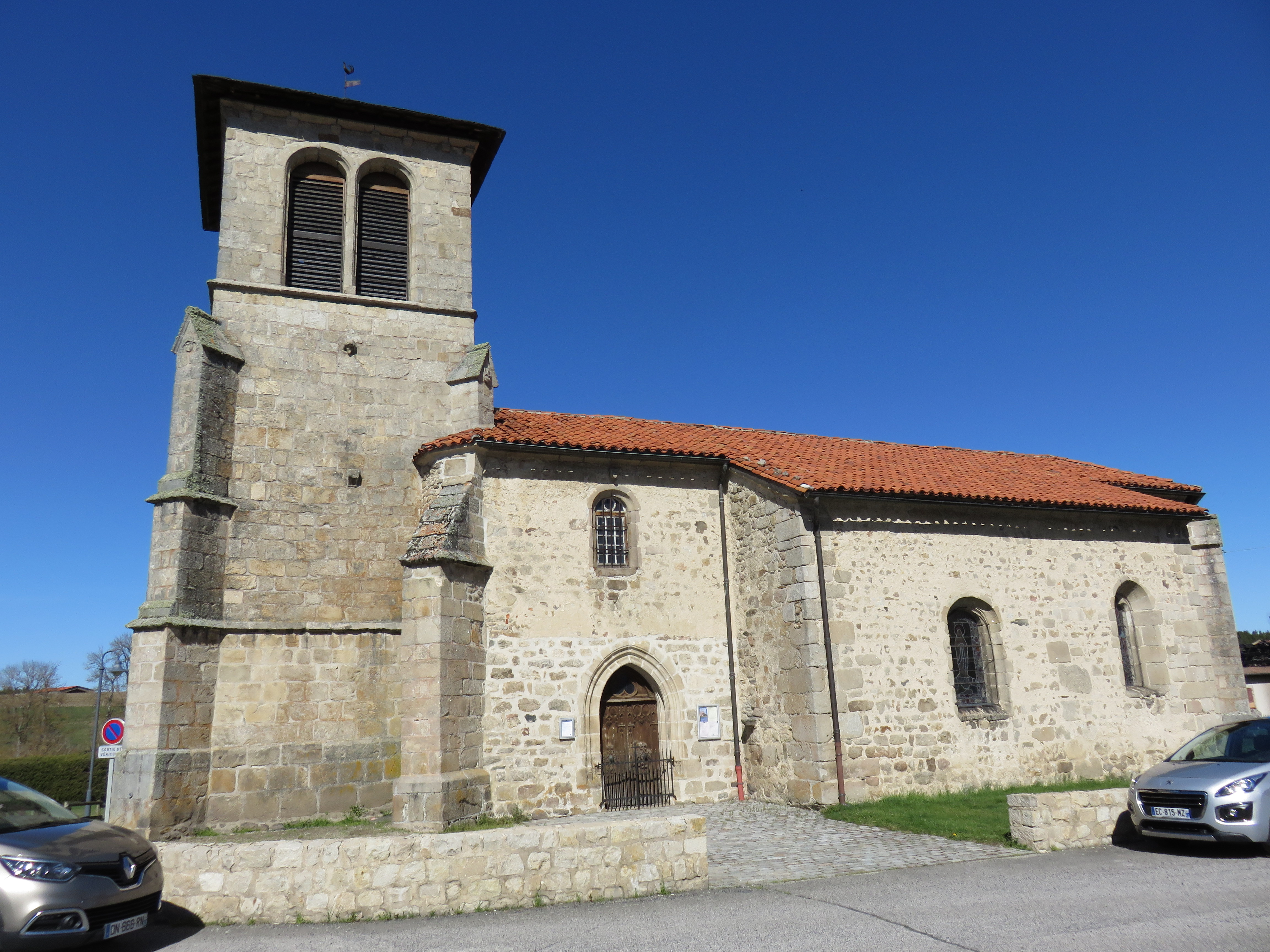 Église Saint-André de Jullianges, dans la Haute-Loire.